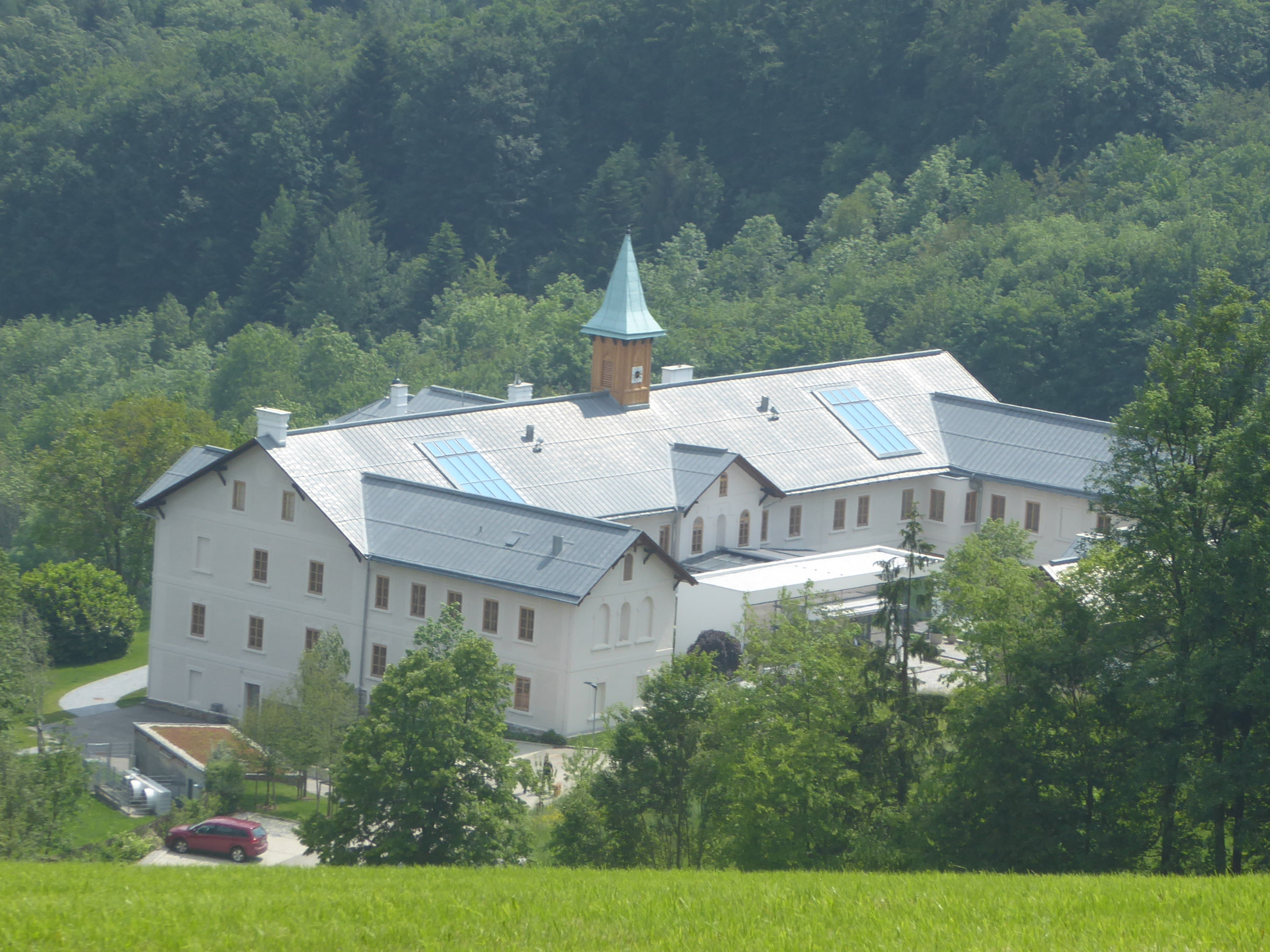 Refugium Hochstraß, ehem. Kloster des Ordens der Töchter der göttlichen Liebe, landw. Haushaltsschule, Hochstraß 7, Stössing, Niederösterreich